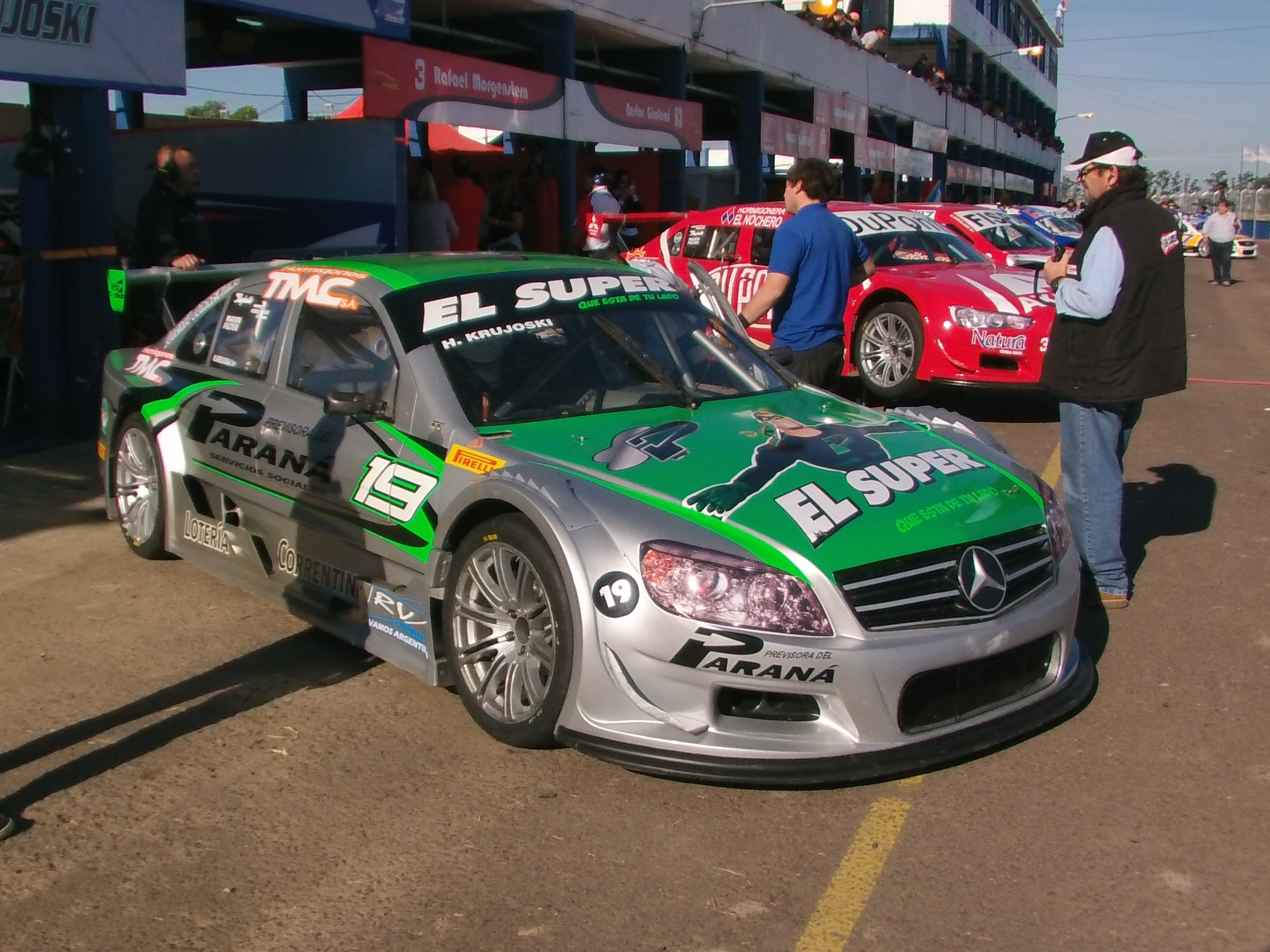 Unidad Mercedes-Benz Clase C del equipo RV Competición, de la categoría argentina de automovilismo, Top Race V6.